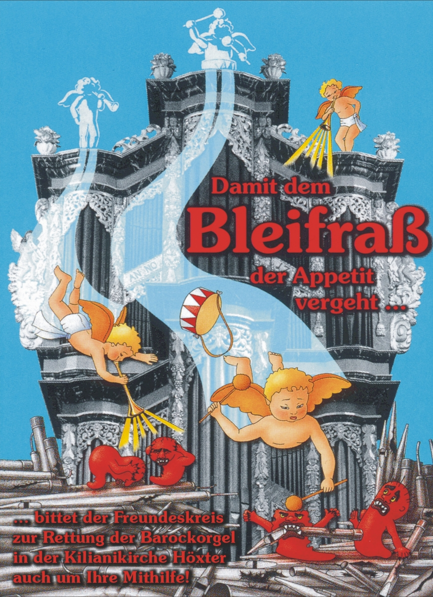 Plakat zur Orgelspendenaktion "Damit dem Bleifraß der Appetit vergeht" - Grafik: Sabine Schmithals